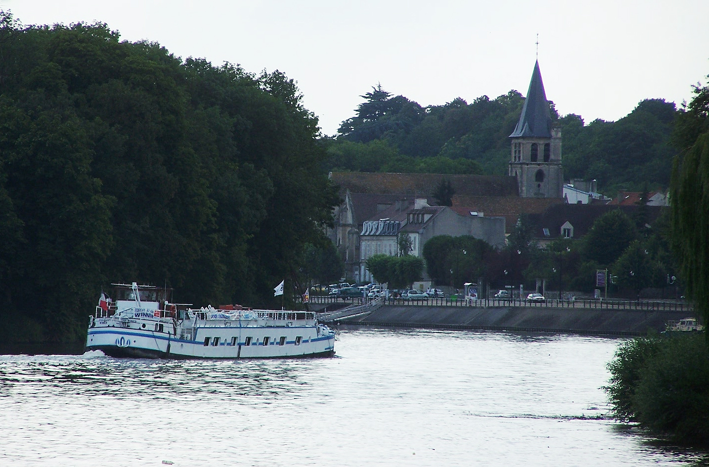 Bateau à l'entrée du village d'Andrésy